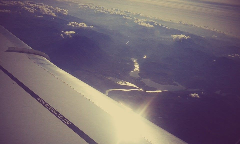 Kukesi nga lart